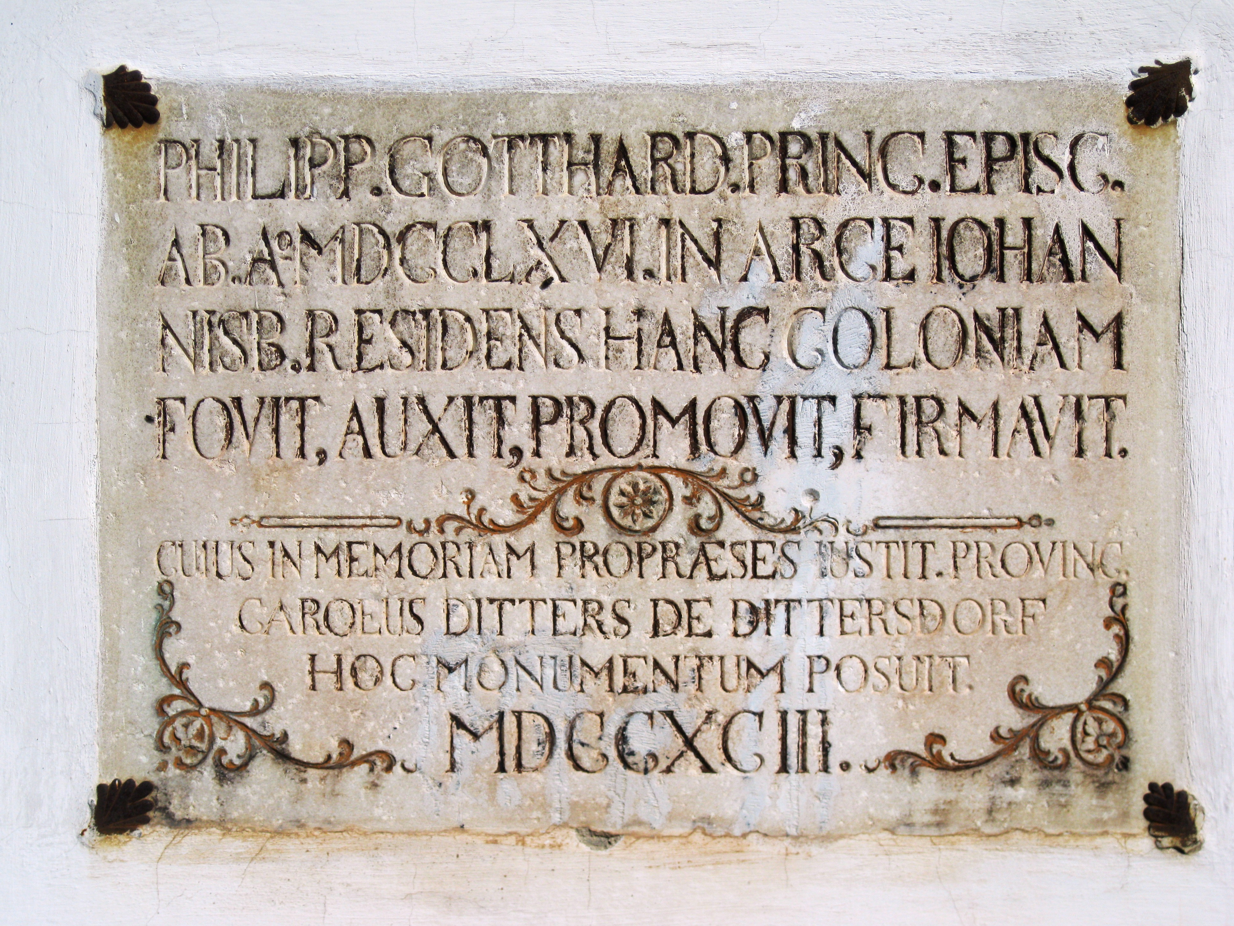 Pomník Karla Ditterse z Dittersdorfu (Město Javorník), Puškinova, Město Javorník